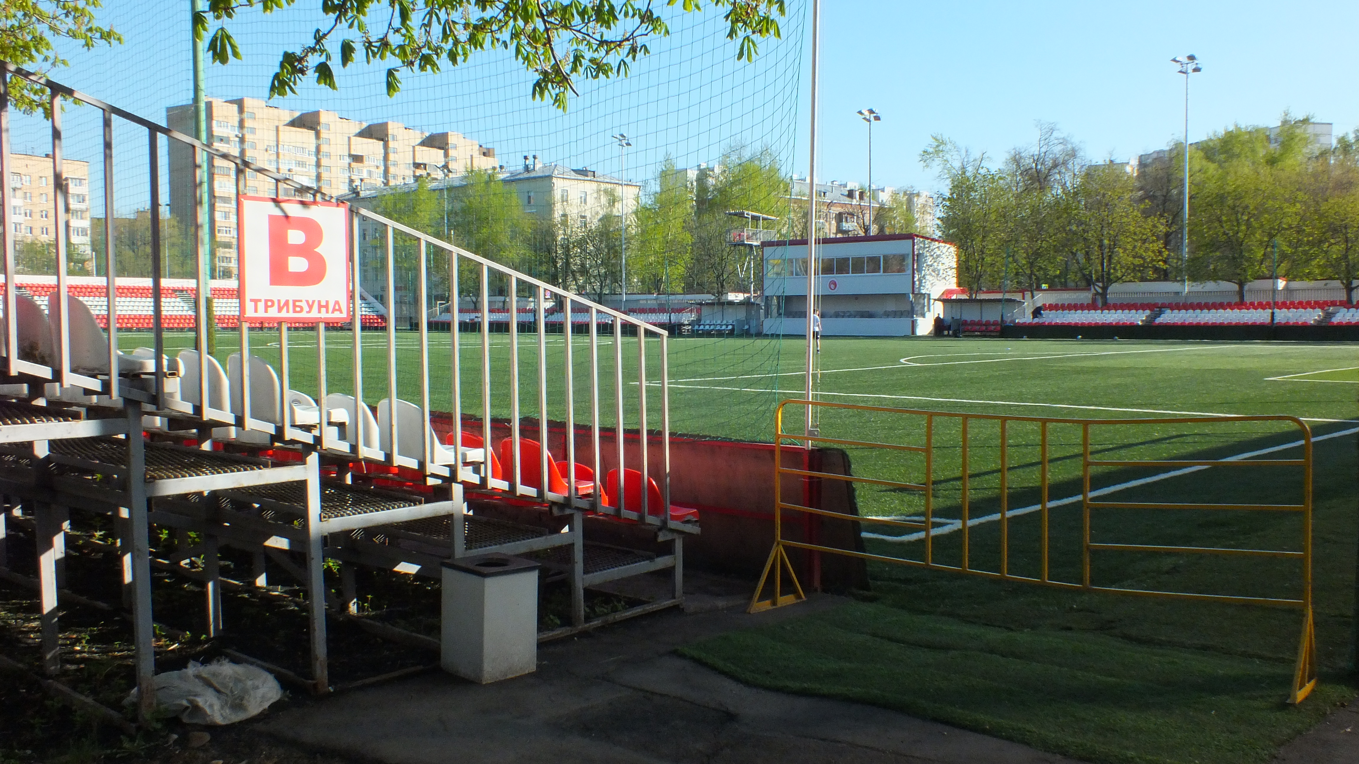 Стадион «Спартаковец» имени Н. П. Старостина, май 2017 года. Вид с 4-й Гражданской улицы